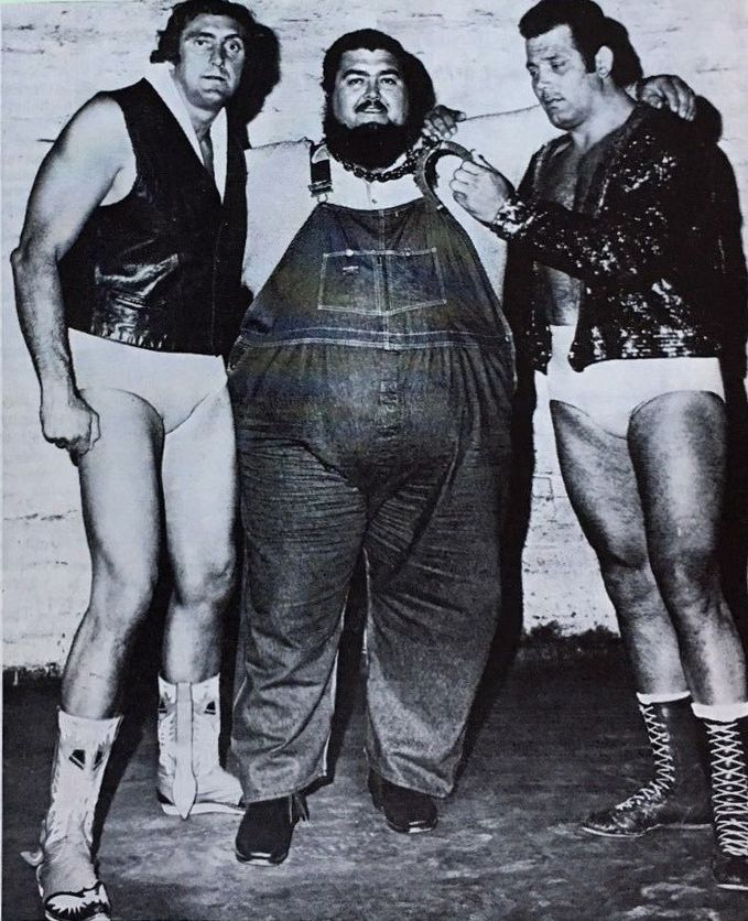 Tex McKenzie, Haystacks Calhoun and Mario Milano en couverture du n.24 du magazine de catch Wrestling News